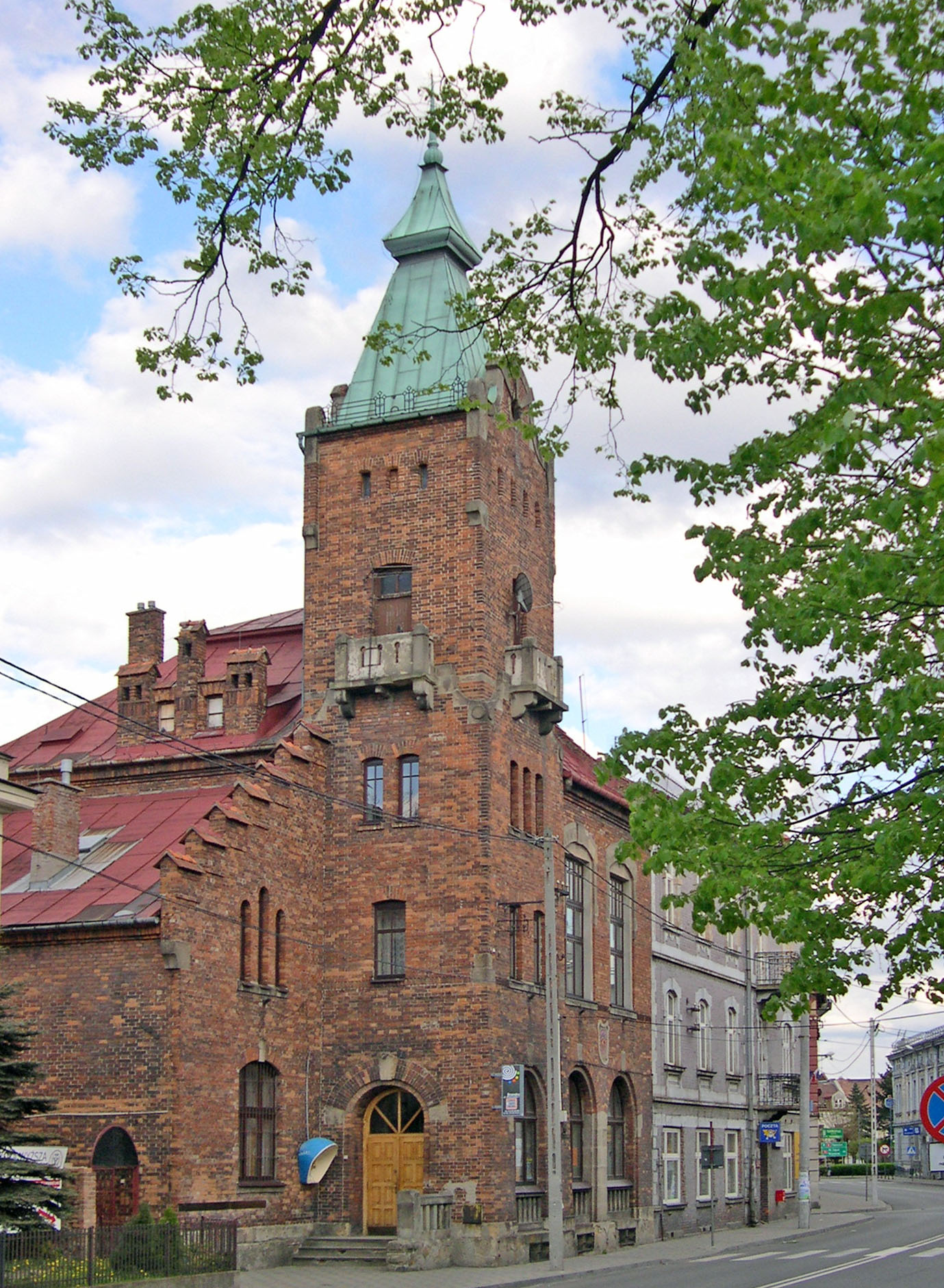 Ratusz miejski. Brzesko Okocim, woj. małopolskie.